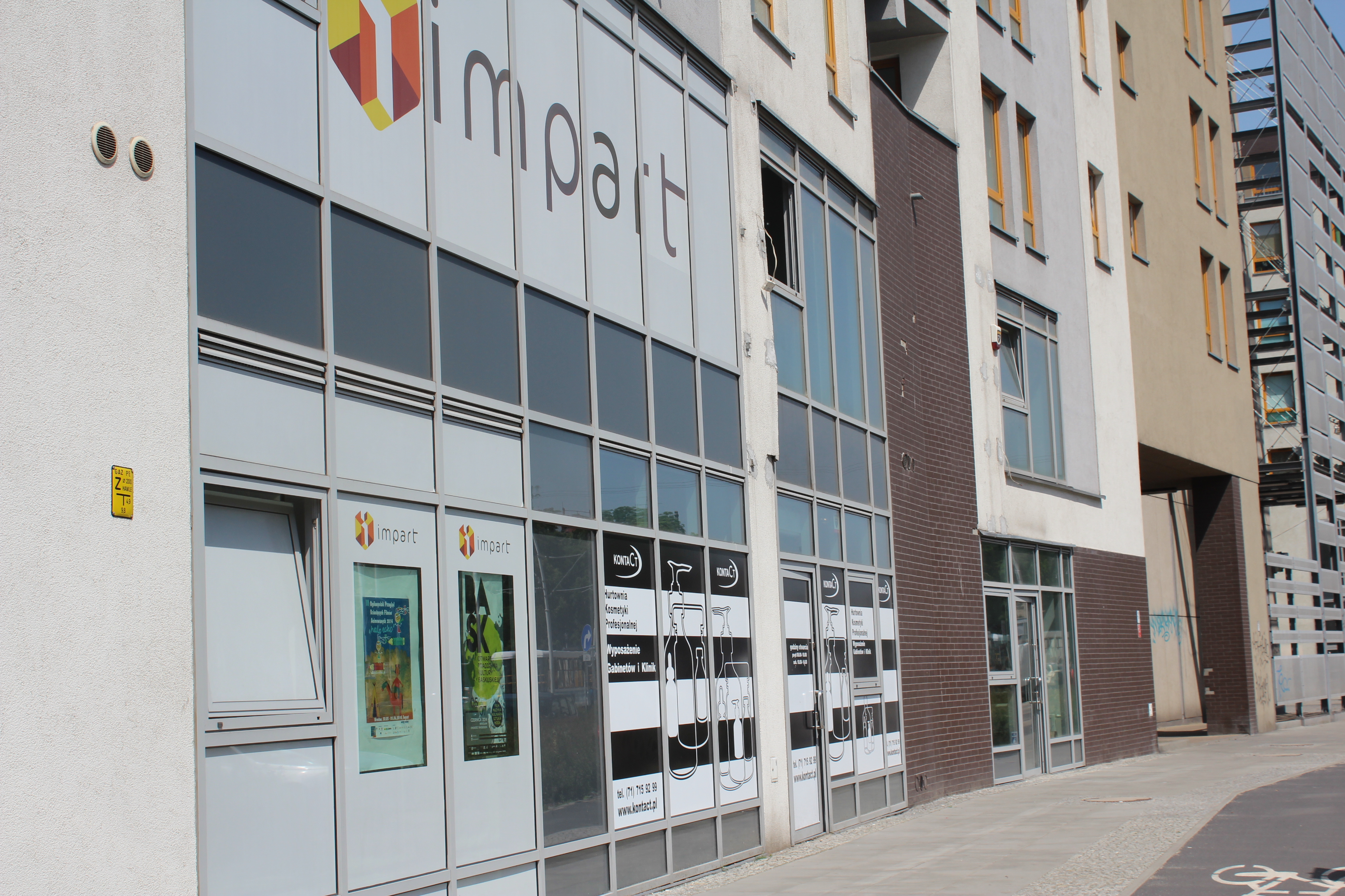 Kancelária Impart na ul. Komuny Parijskiej 39-41, pohľad z ulice Pułaskiego, Vroclav.